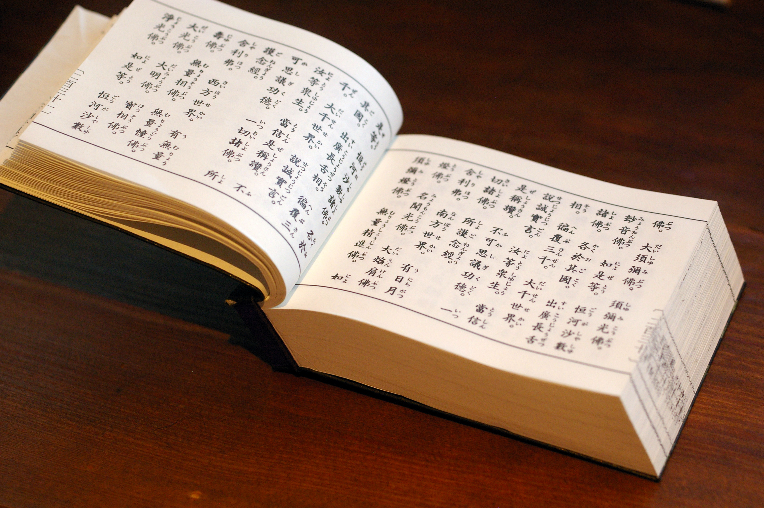 《佛说阿弥陀经》 姚秦鸠摩罗什译